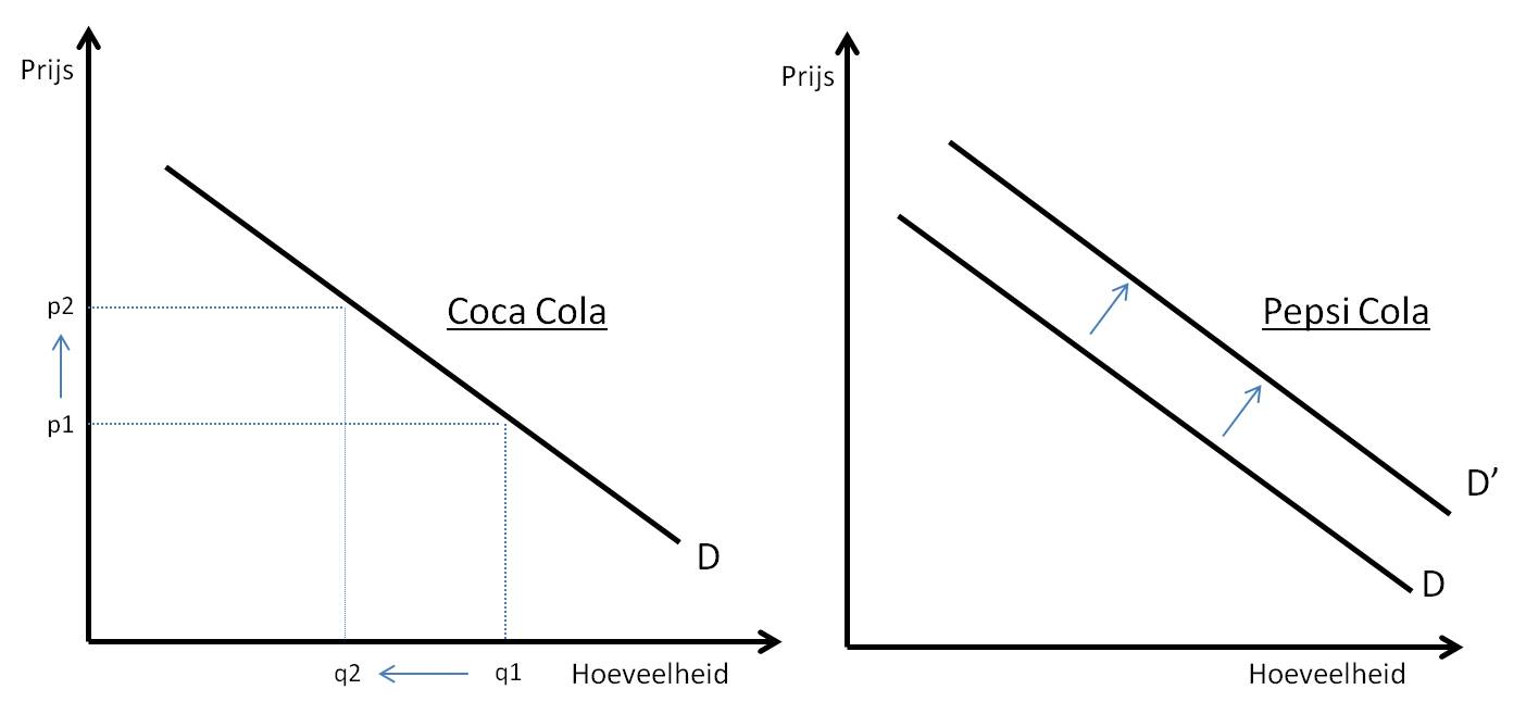 Plaatje voor een artikel over een substitutiegoed op wikipedia